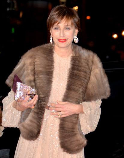 Kristin Scott Thomas à la cérémonie des César